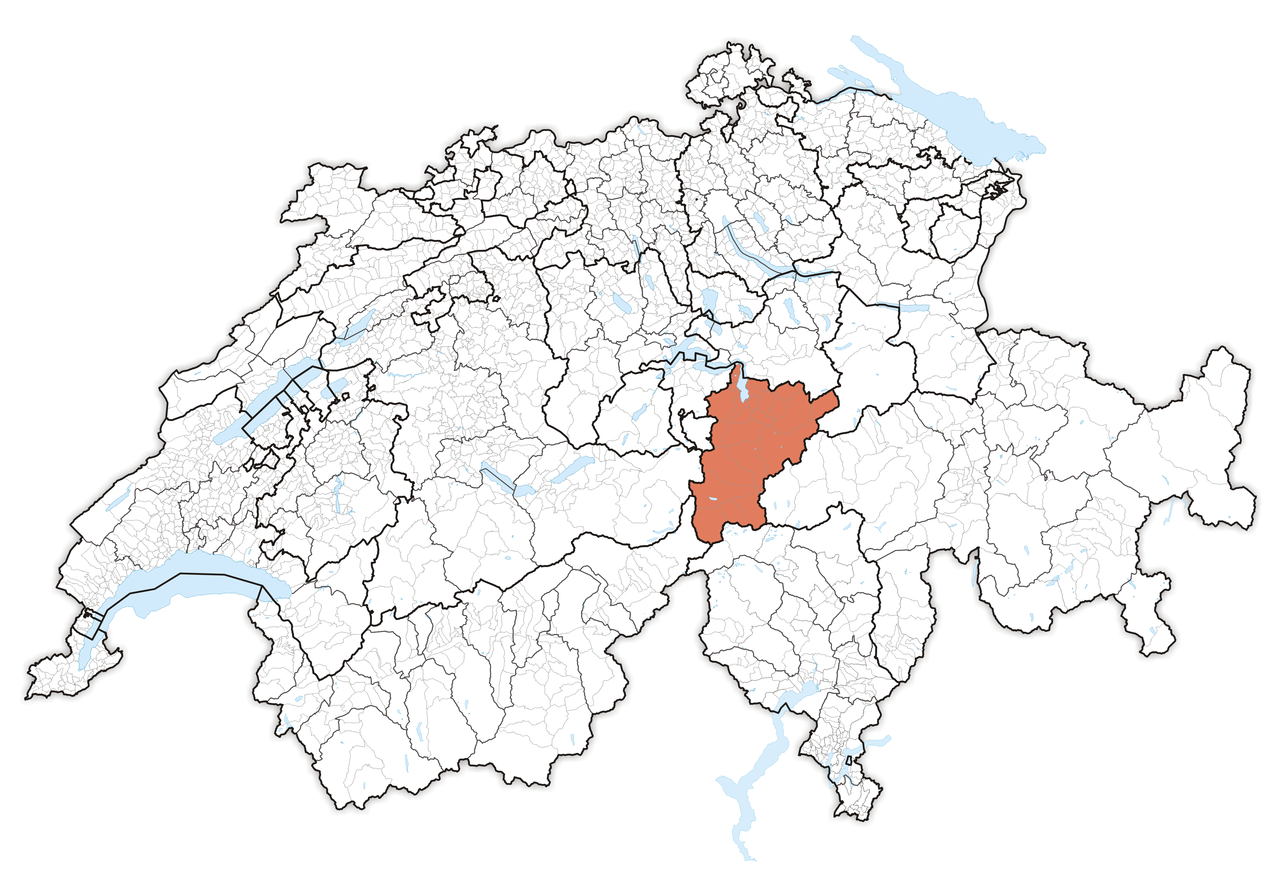 Canton Uri